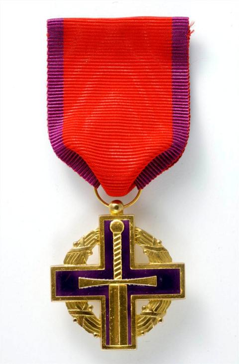 Норвежская медаль Вооружённых сил "За ранение при боевых действиях"